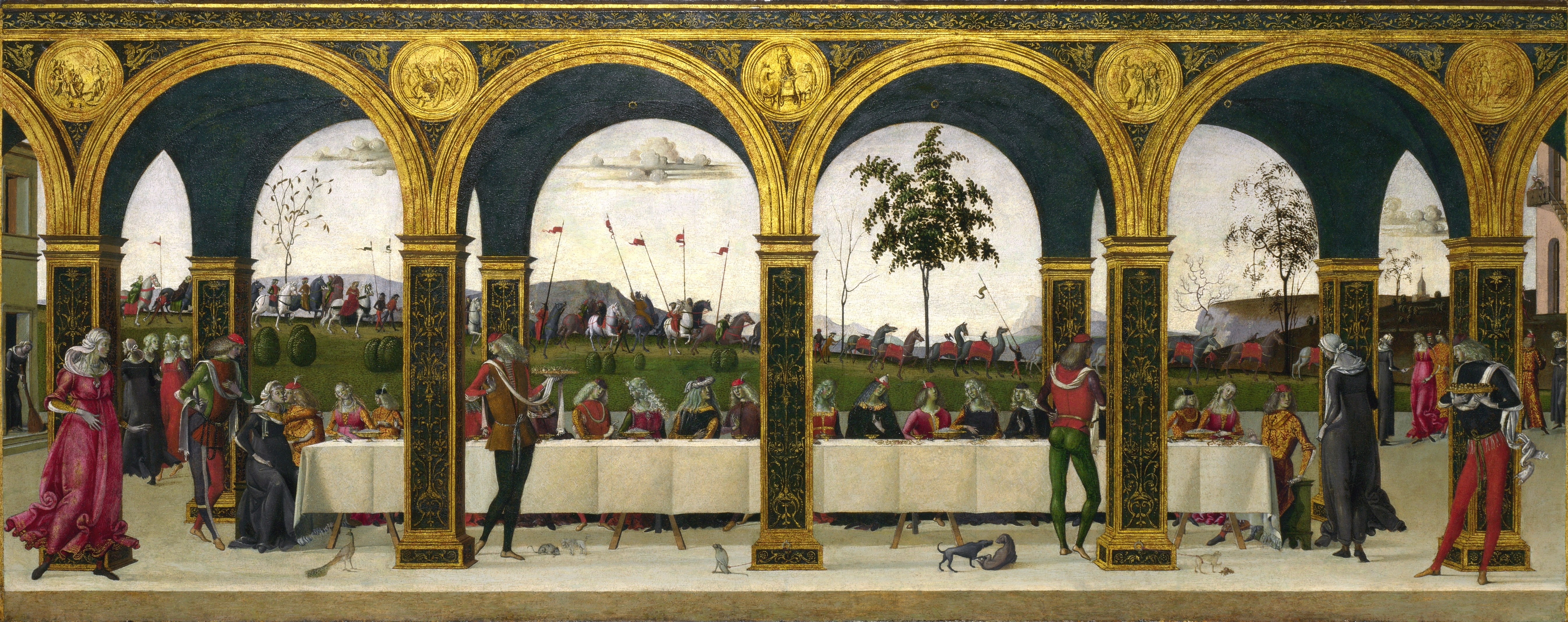 Мастер истории Гризельды. История Гризельды. Воссоединение. Ок. 1490-х. Лондон, Национальная галерея